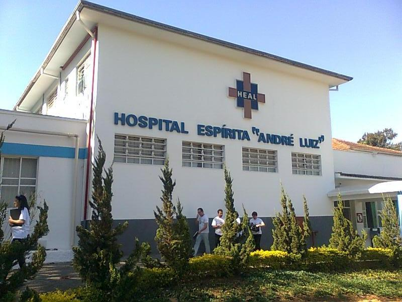 Façade de l'hôpital spirite "André Luiz", situé à Betania, banlieu de Belo Horizonte, état de Minas Gerais, Brésil. 2008